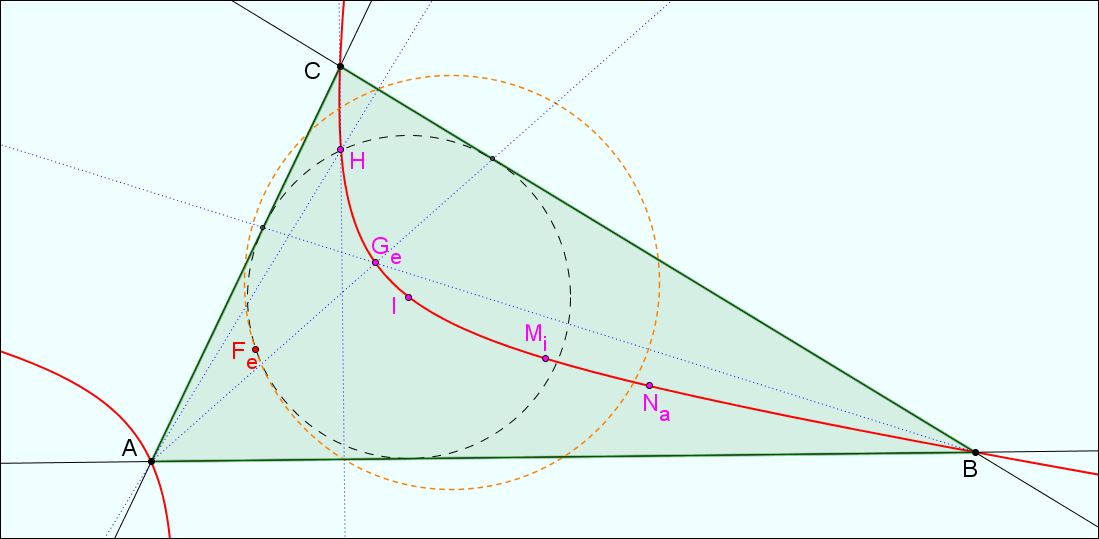 hyperbole de Feuerbach